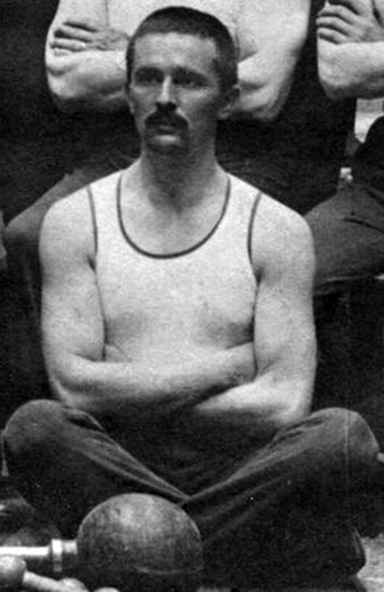 Вељко Чубриловић (1886-1915), био је српски политички вођа, припадник тајне организације „Млада Босна“, али и активни члан српског Соколског покрета. Време настанка фотографије: 1912. Место настанка фотографије: Сарајево (Österreichisch-Ungarische Monarchie: 1867-1918). Назив манифестација: Српски соколски учитељски курс одржан од 1. јула до 2. августа 1912. године.